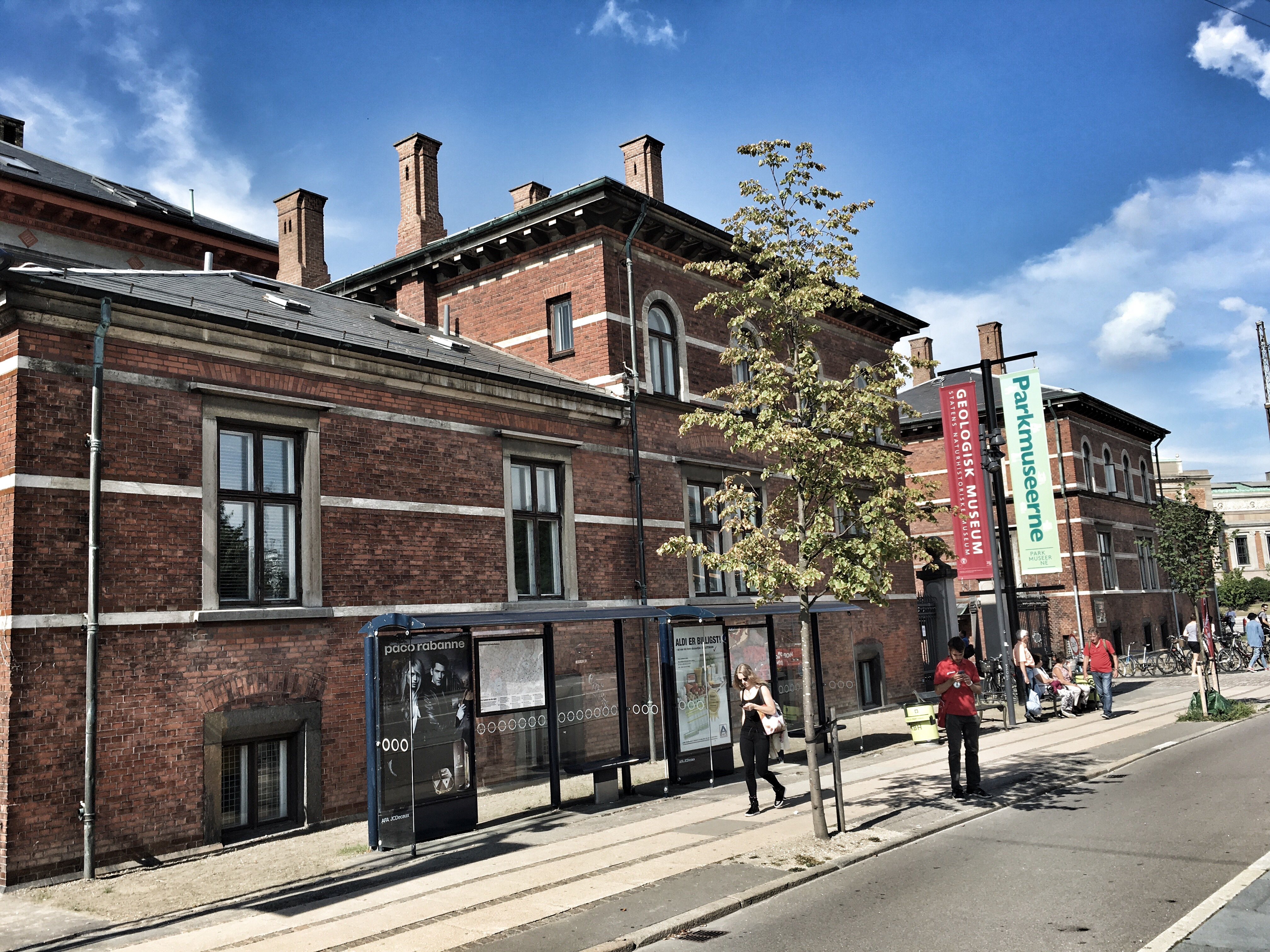 Geologisk Museum, København